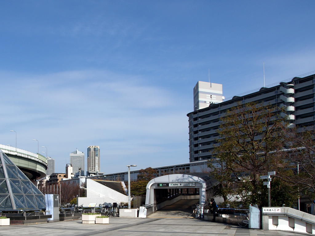 大阪市営地下鉄中央線朝潮橋駅 所在地：大阪府大阪市港区